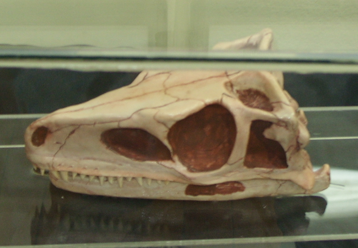 Réplica do crânio do Estauricossauro, primeiro dinossauro brasileiro encontrado na Cidade de Santa Maria, Rio Grande do Sul, Brasil.